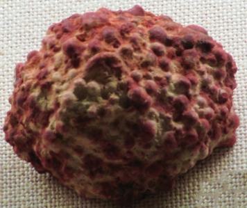 Bauxit (Gibbsit Al (OH)3, Diaspor, α-AlOOH, Böhmit, y-AlOOH); Universität Hamburg (2016) - Foto: GeoTrinity